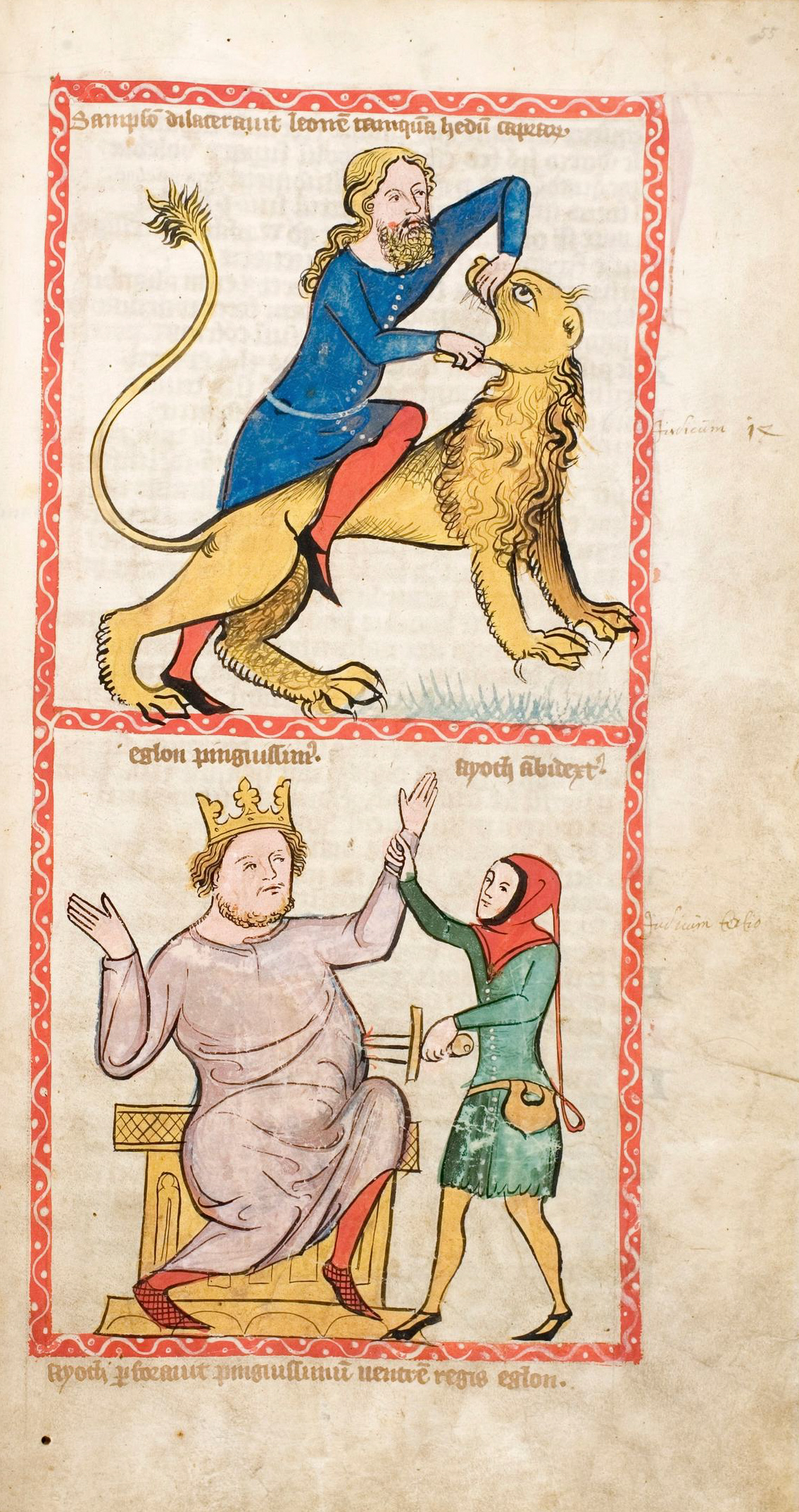 Speculum Humanae Salvationis, Westfalen oder Köln, um 1360. ULB Darmstadt, Hs 2505, fol. 55r